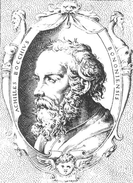 Ritratto di Achille Bocchi, incisione, in Symbolicarum quaestionum, Bononiae 1555